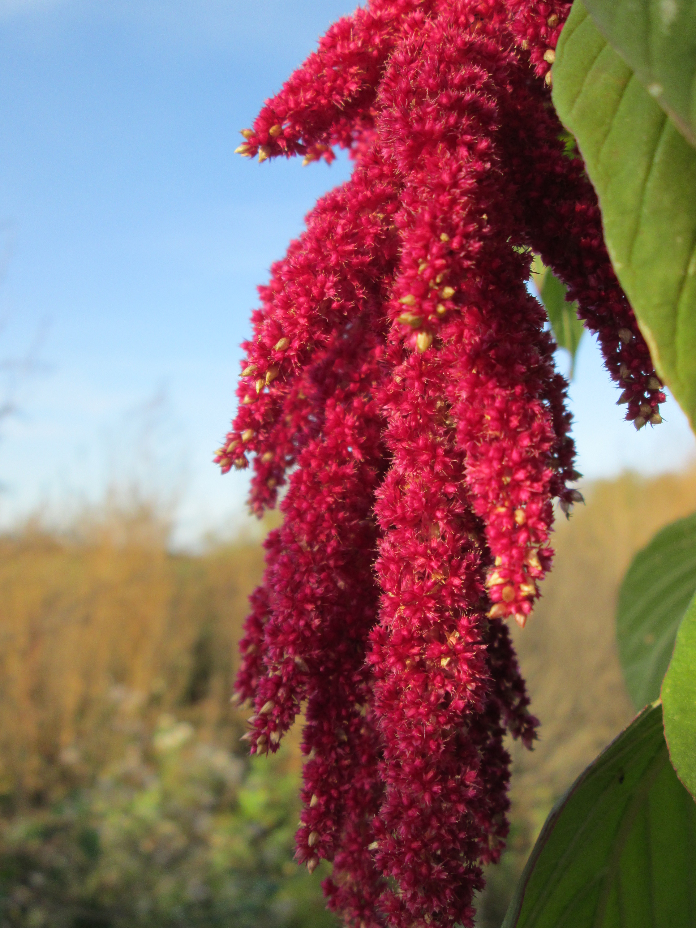 Ausgewilderter Garten-Fuchsschwanz (Amaranthus caudatus) bei Reilingen